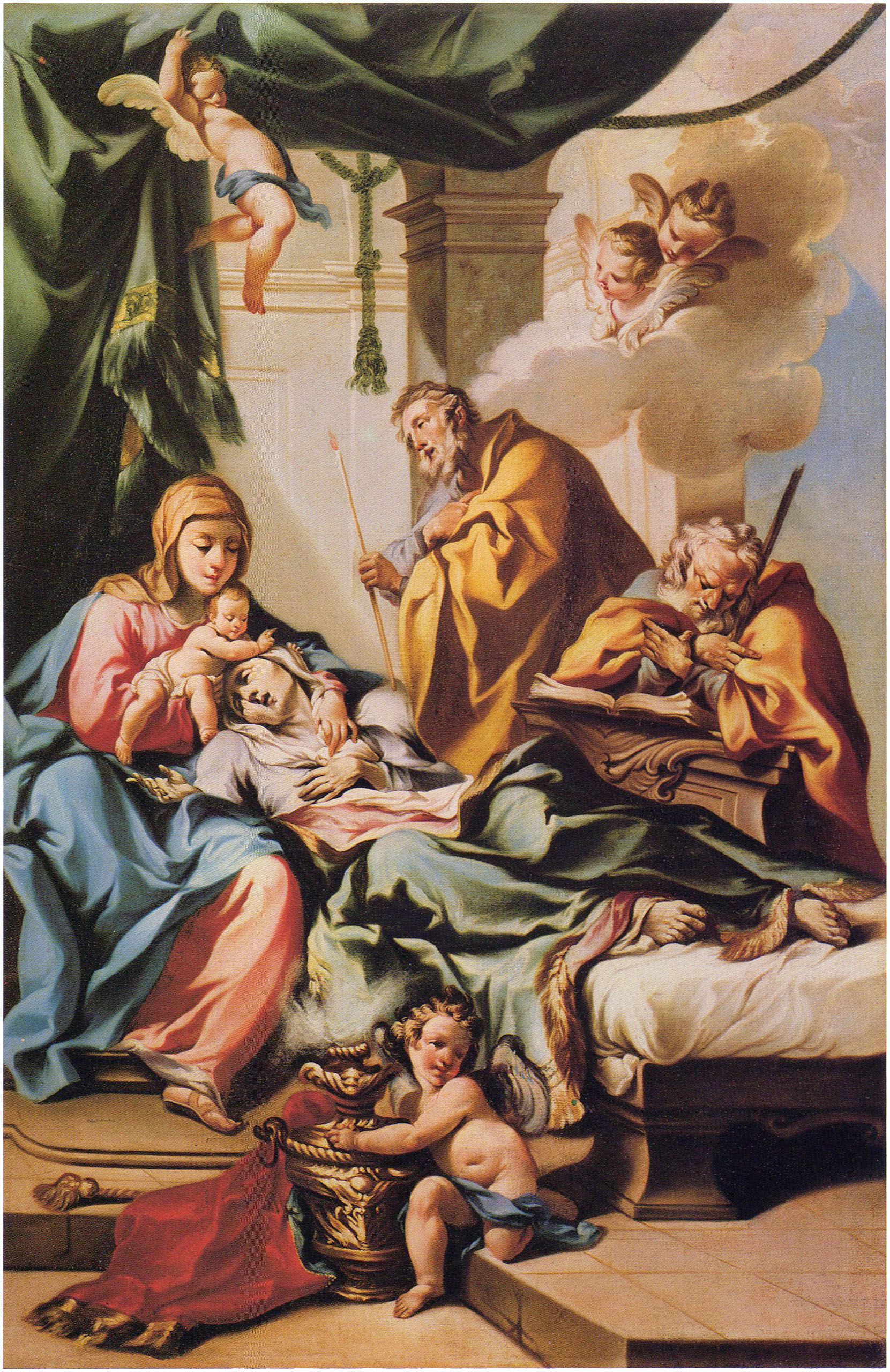 Morte di sant'anna (francesco monti, chiesa di san zeno al foro, brescia)